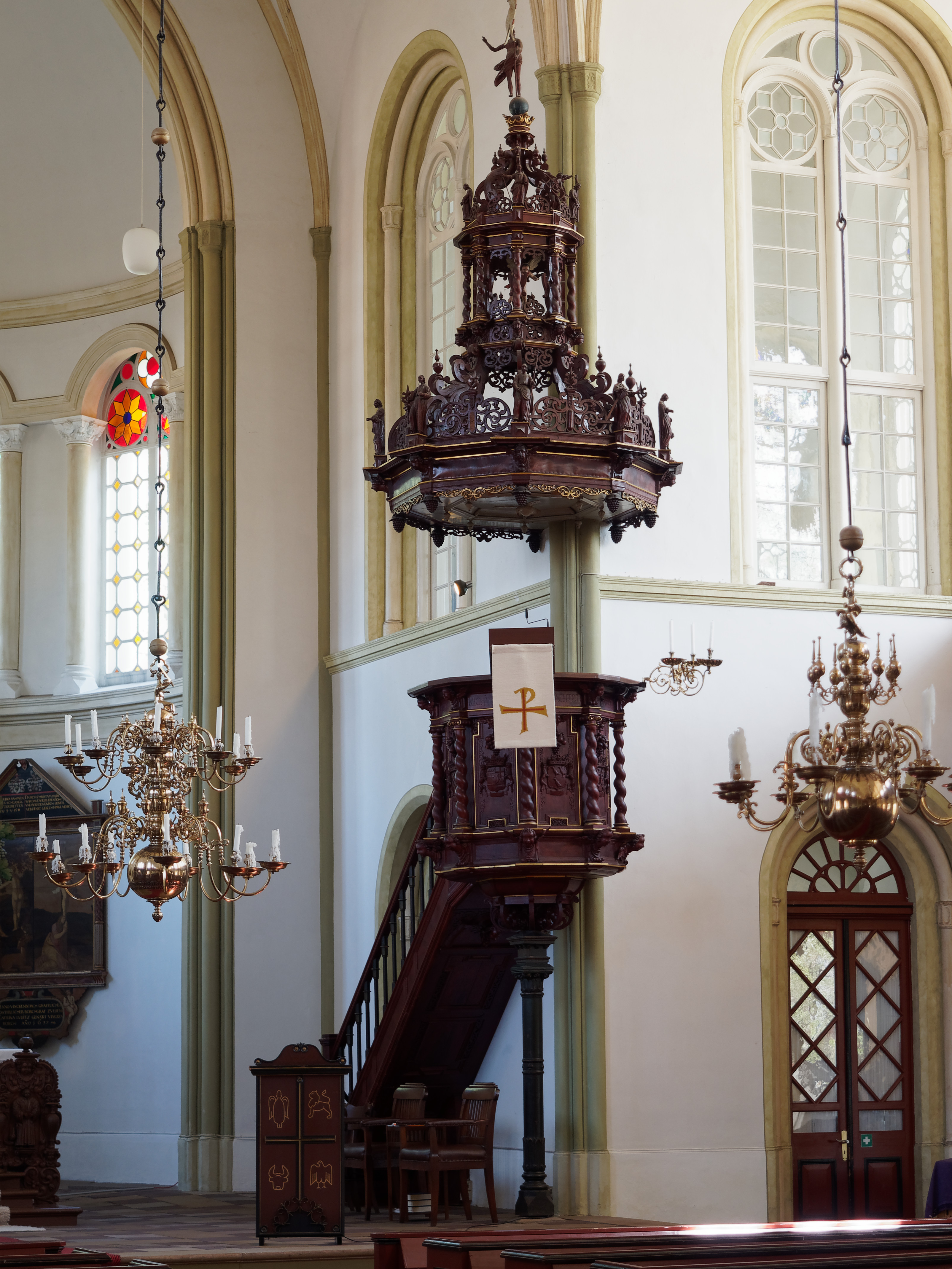 Kanzel von 1674 von Jacob Cröpelin in der St. Magnus Kirche in Esens (Kreis Wittmund, Ostfriesland).